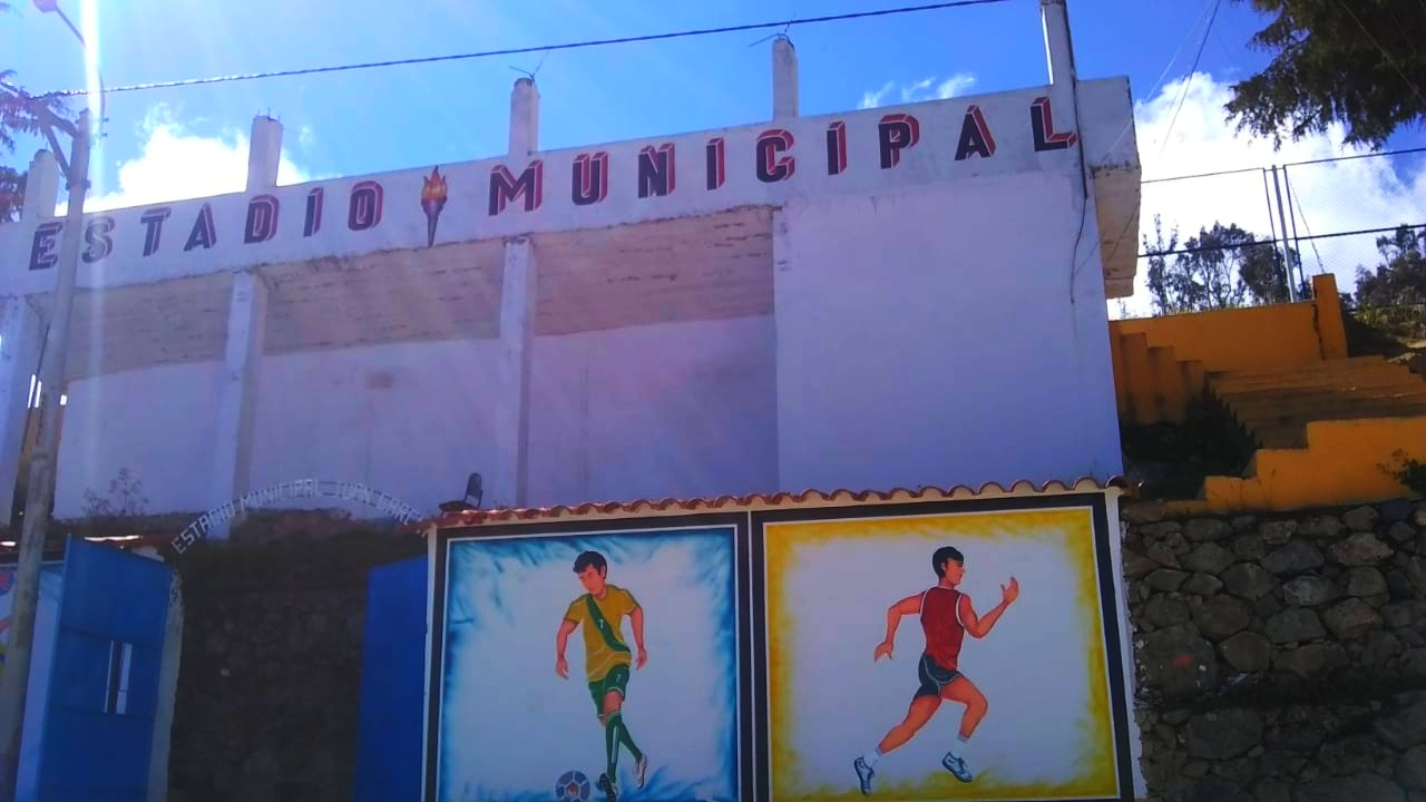 fachada del estadio municipal Juan García de Pampas Grande